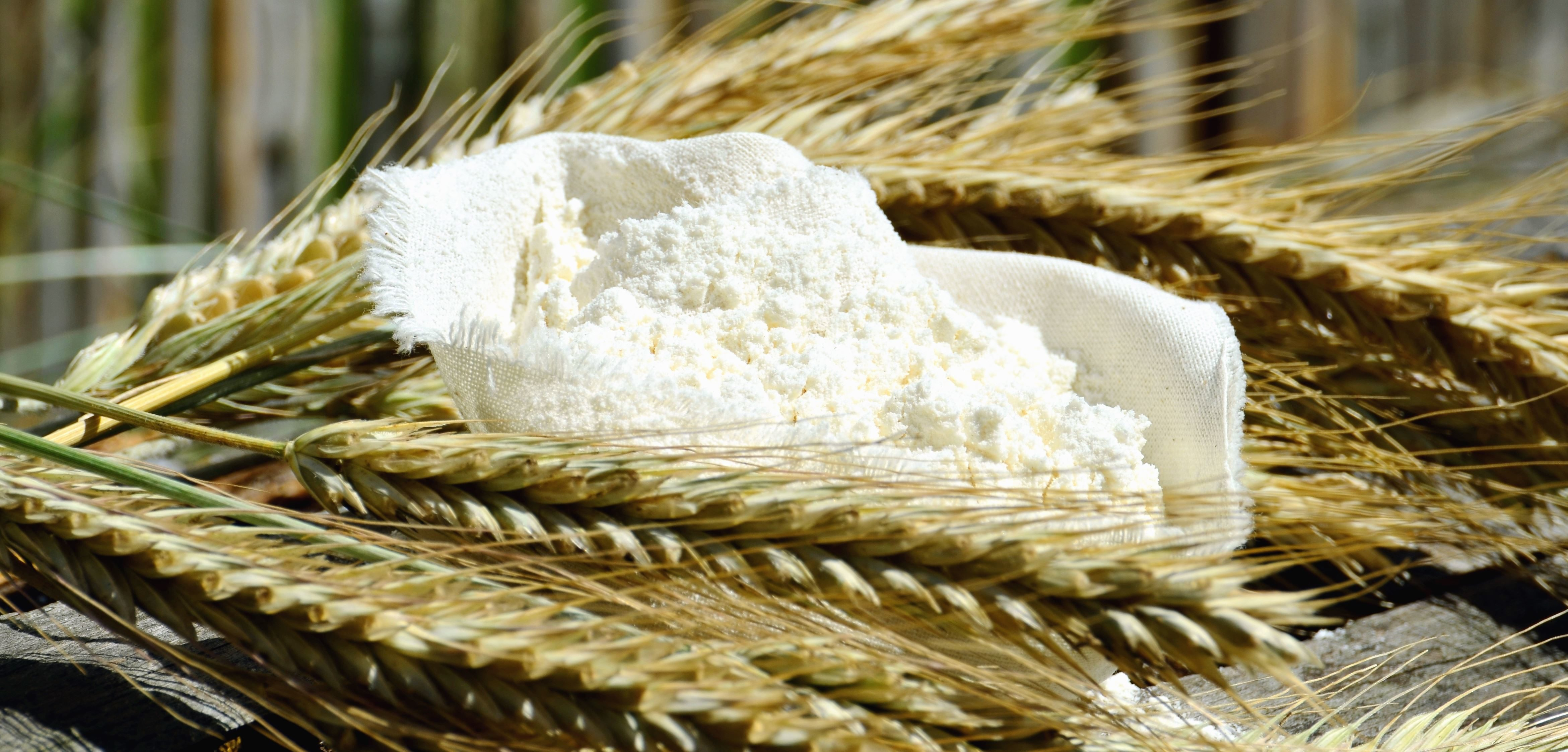 Farine de blé